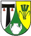 Wappen Beuren/Eifel